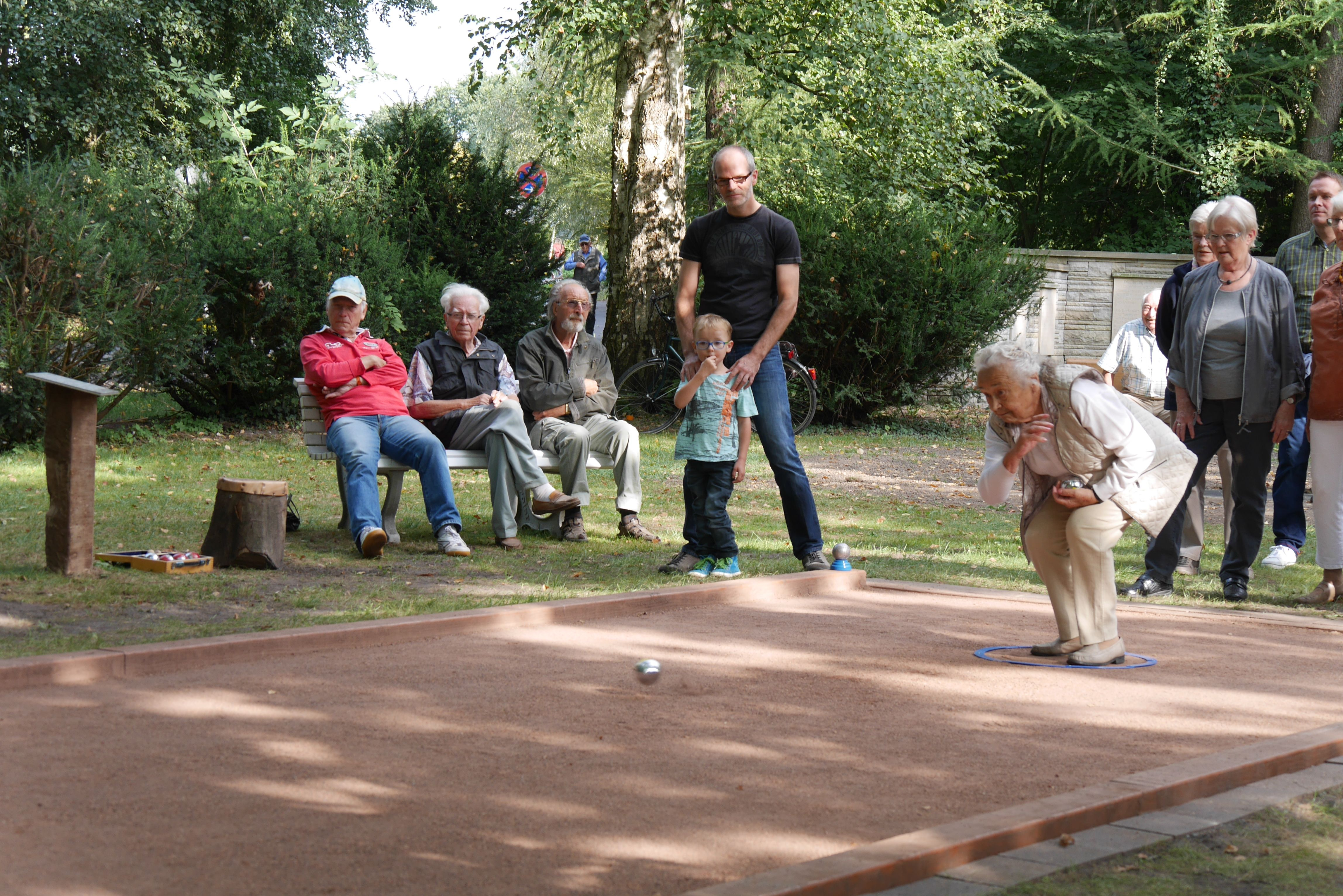 Die neue Boulebahn auf dem Dorfplatz.